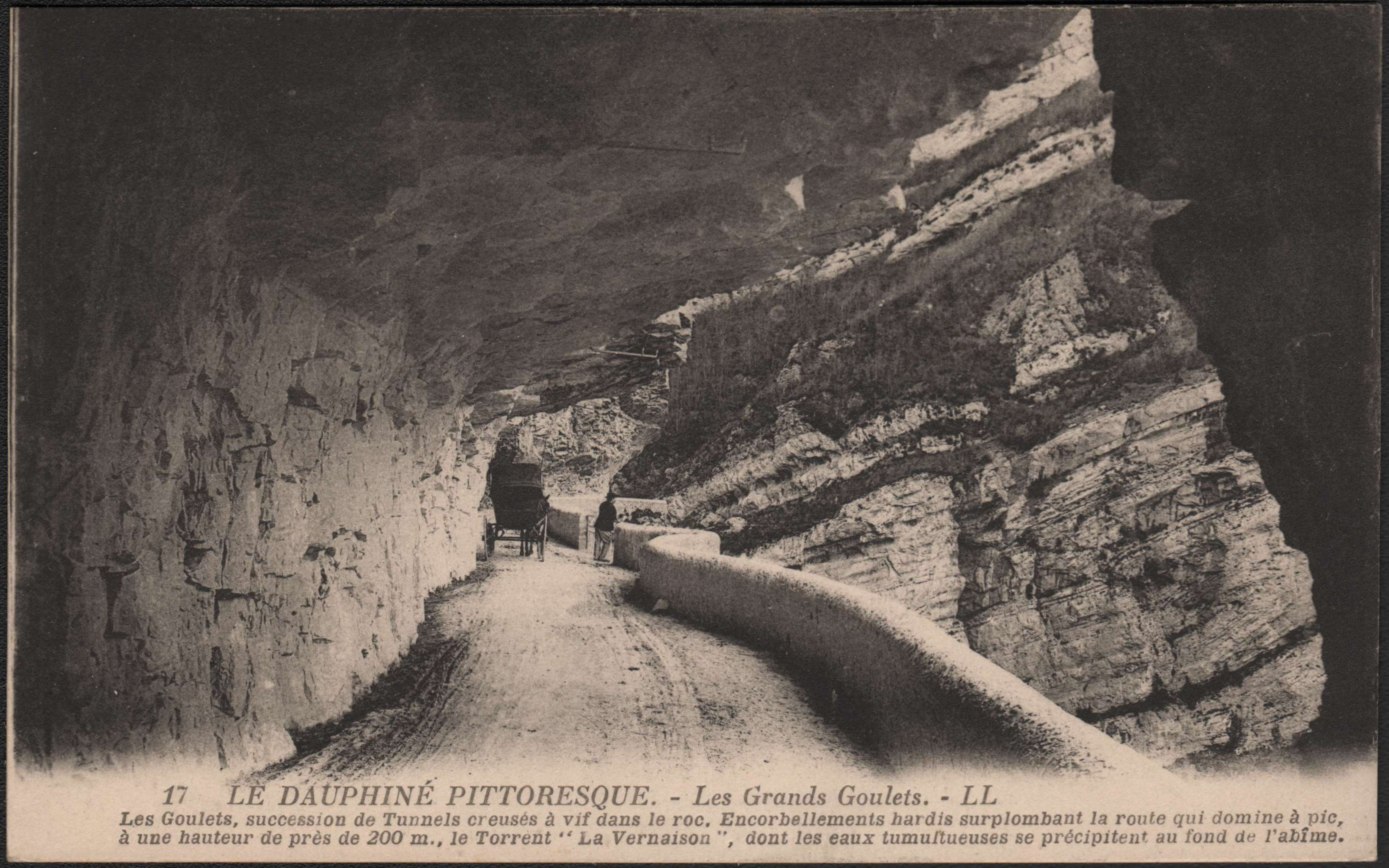 Le Grands Goulets. - Levy et Neurdein Reunis - Le Dauphiné Pittoresque.